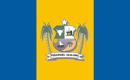 Paraipaba Bandeira